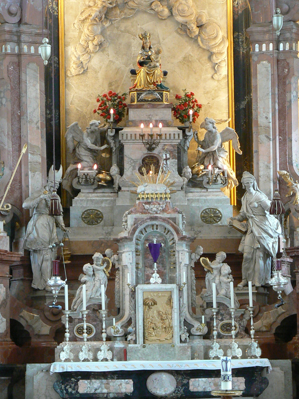 Wallfahrtskirche Birnau, Hauptaltar mit Gnadenbild